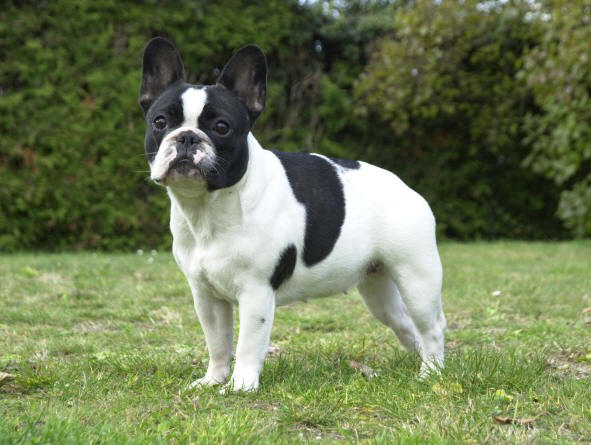 Bulldog francais